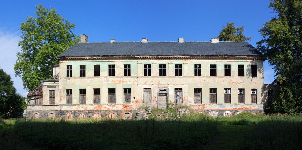 Sosny - dwór z pocz. XIX w. (zabytek nr 2102)